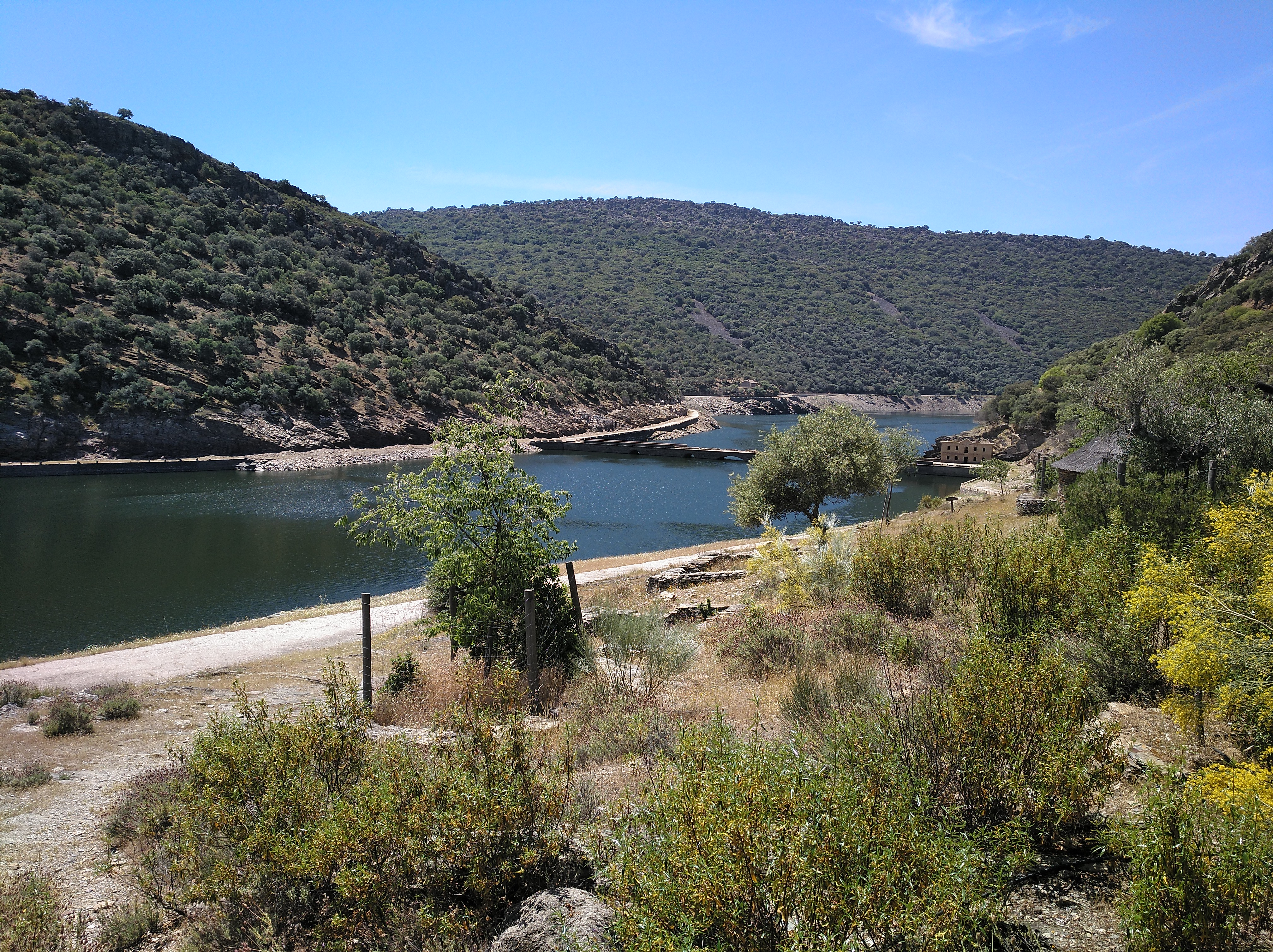 Monfragüe This is a photography of a Special Area of Conservation in Spain with the ID: ES4320077. Natura2000 entry, EEA entry